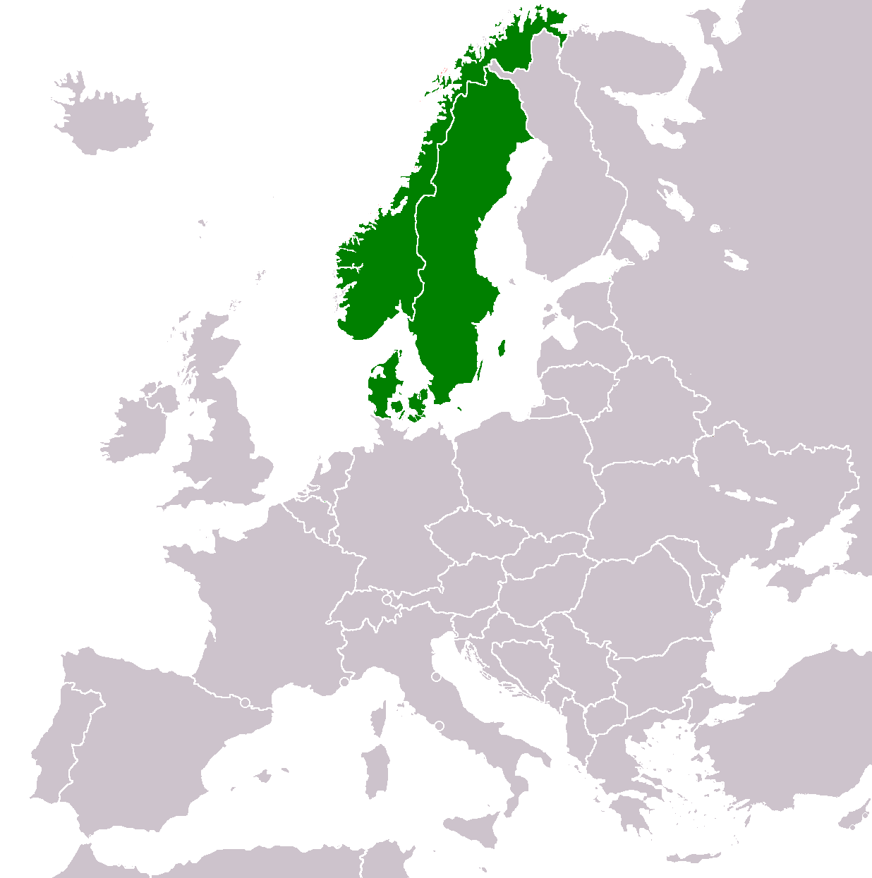 Coop Norden in Europe